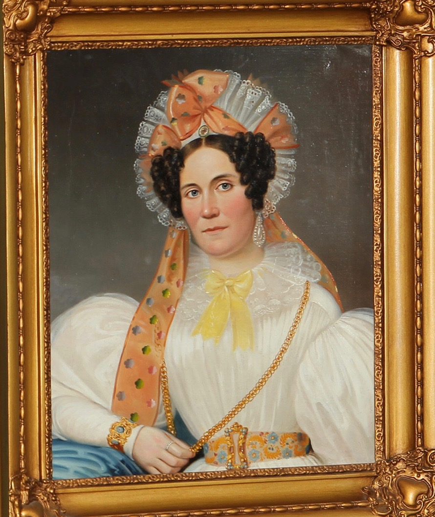 muotokuva, moision kartano